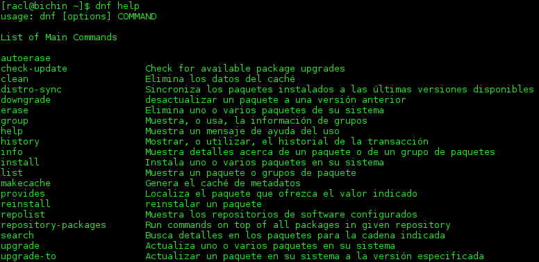 Captura de pantalla